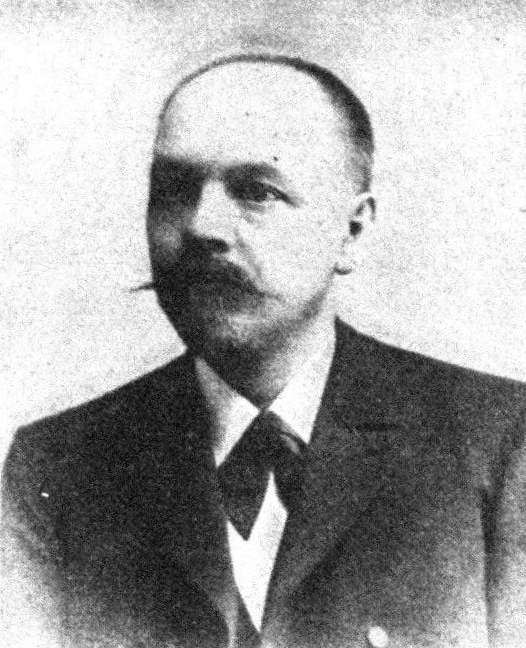 Österreichischer Politiker, Reichsratswahl 1907, Name siehe Dateiname